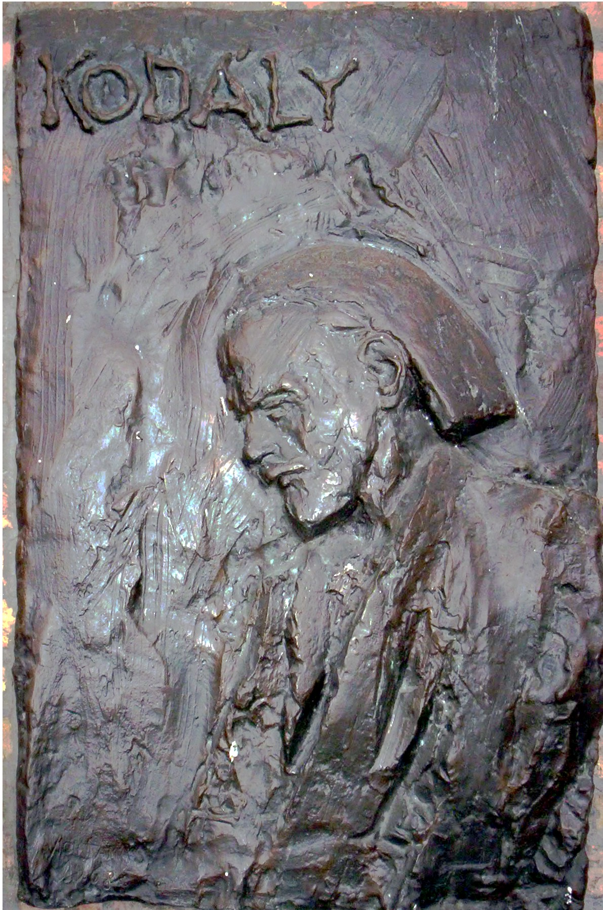 Kodály Zoltán. Dombormű a szegedi Pantheonban. Vígh Tamás alkotása